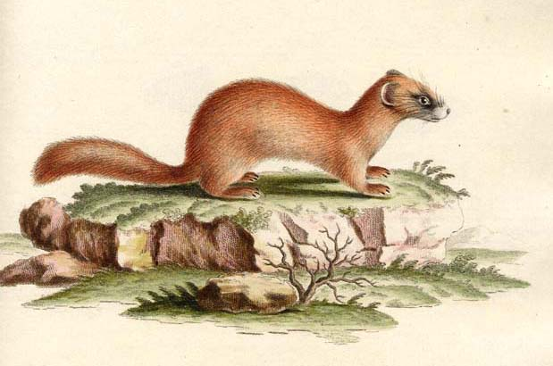 Mustela sibirica, plate from Schreber, Johann Christian Daniel von, Histoire naturelle des quadrupèdes représentés d´après nature. Tome III. Le phoque, le chien, le chat, le putois, la loutre, la marte, l'ours, le didelphe, la taupe, la souris, le hérisson A Erlang, chez Wolfgang Walther, 1780